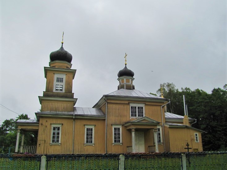 Царква Прападобнай Параскевы Сербскай ў вёсцы Балата Кобрынскага Брэсцкай вобласці Беларусі